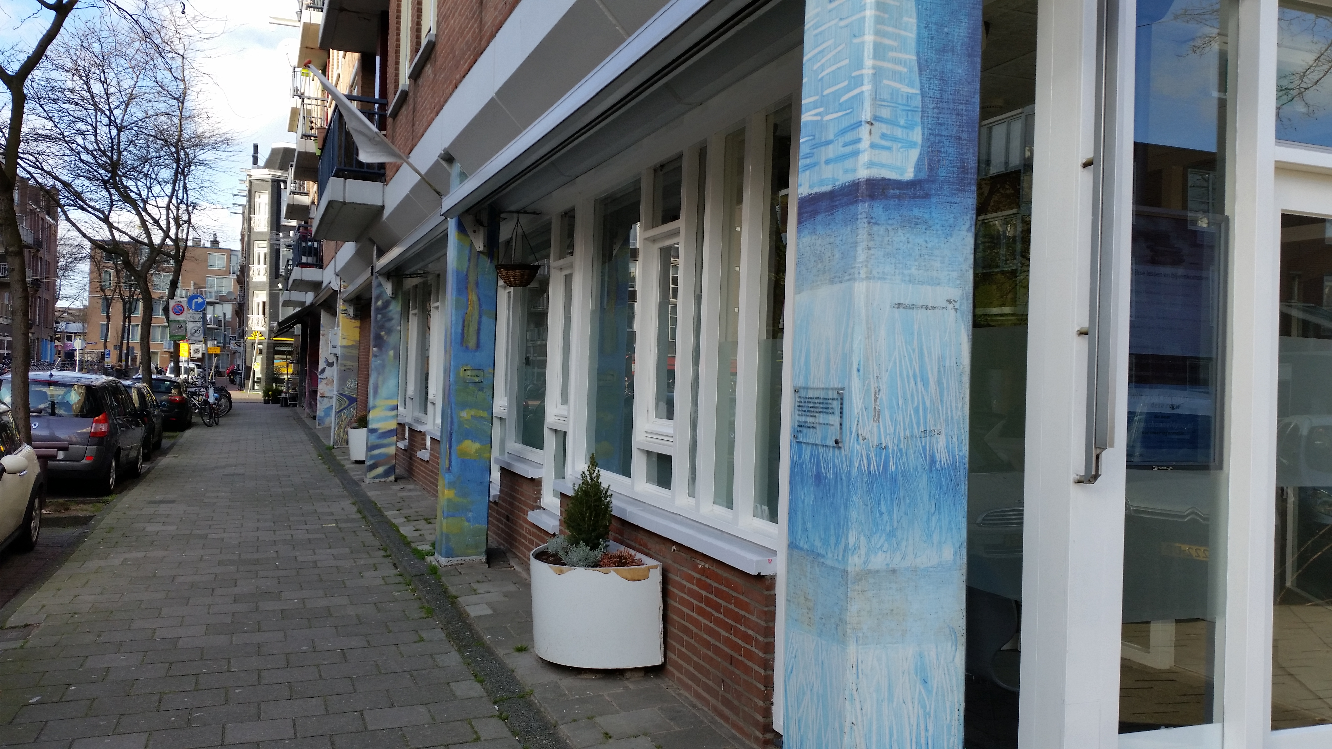 Zeven pilaren N. Beetsstraat, overzicht